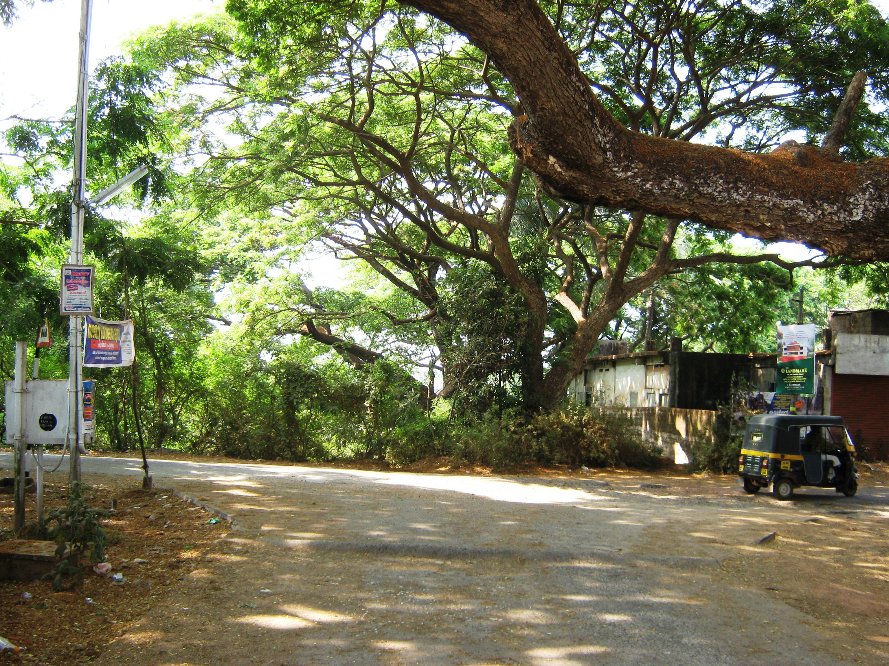 Kanhangad Railway Station, Kerala, India.